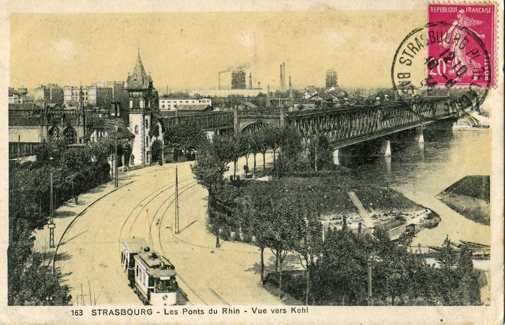 Carte postale ancienne éditée par Au Khédive, n° 163 : Strasbourg - Le Pont de KehlIl s'agit du Pont de l'Europe (Strasbourg) construit en 1897, destiné à la circulation routière et au tramway, dont en voie une rame de la ligne 1 en provenance de l'Allemagne.